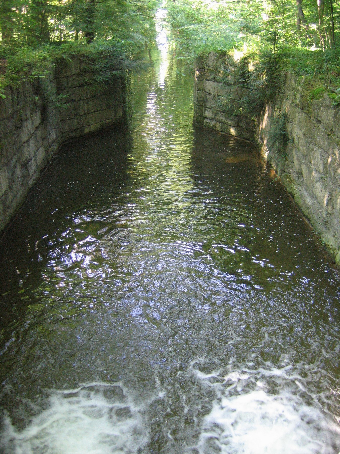 Ehemalige Schleuse im Schlosspark Nymphenburg